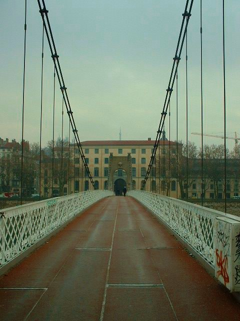 Passerelle du Collège, Lyon